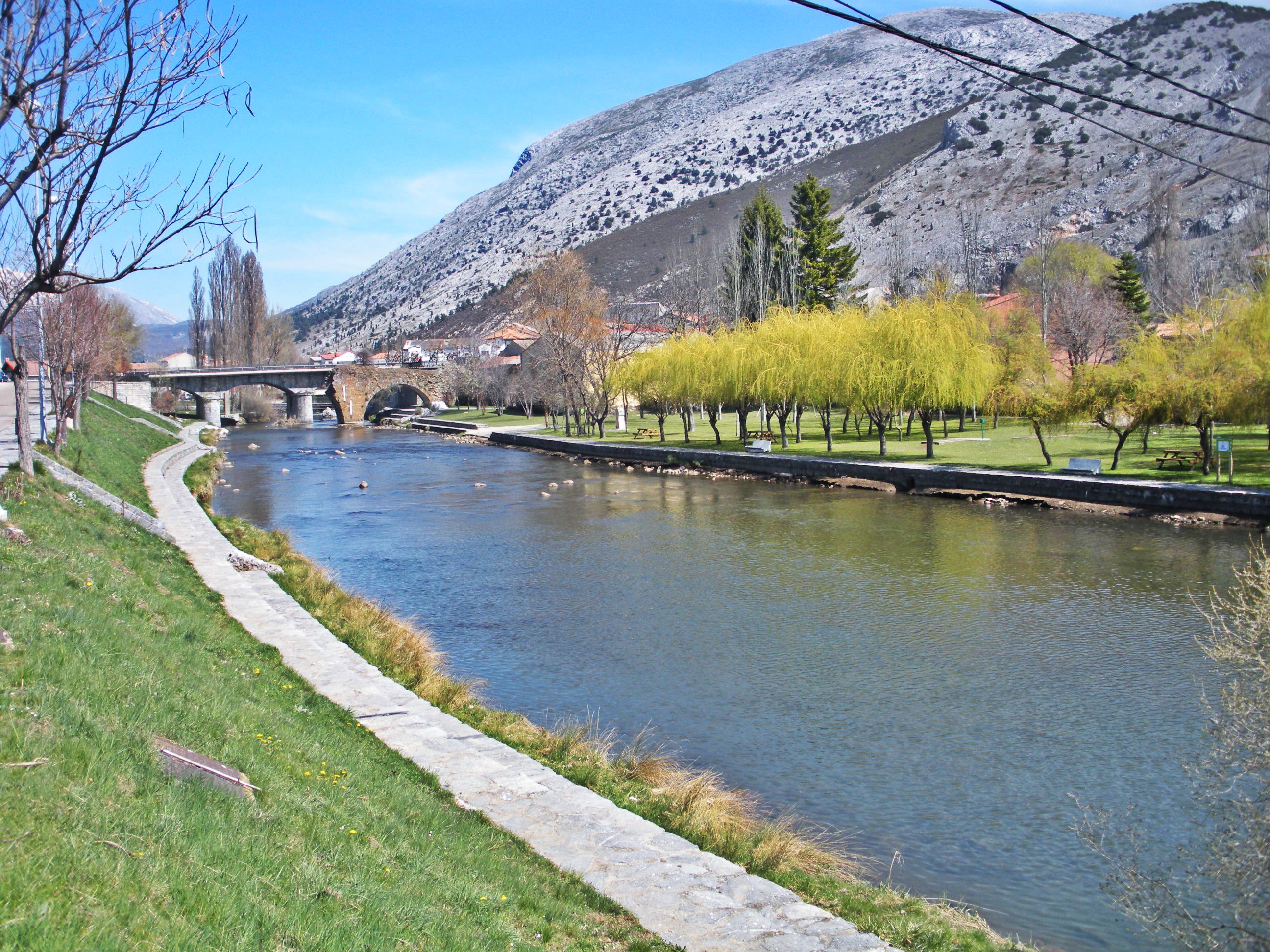 Imagen del Río Carrión, desde la zona de Las Cortes, en Velilla del Río Carrión, Palencia.